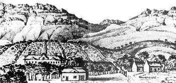 E. V. Stade. Landgoed Constantia bij Kaapstad. 1710. Tekening. Kaapstad, Kaapstad Argiefbewaarplek. Afkomstig uit